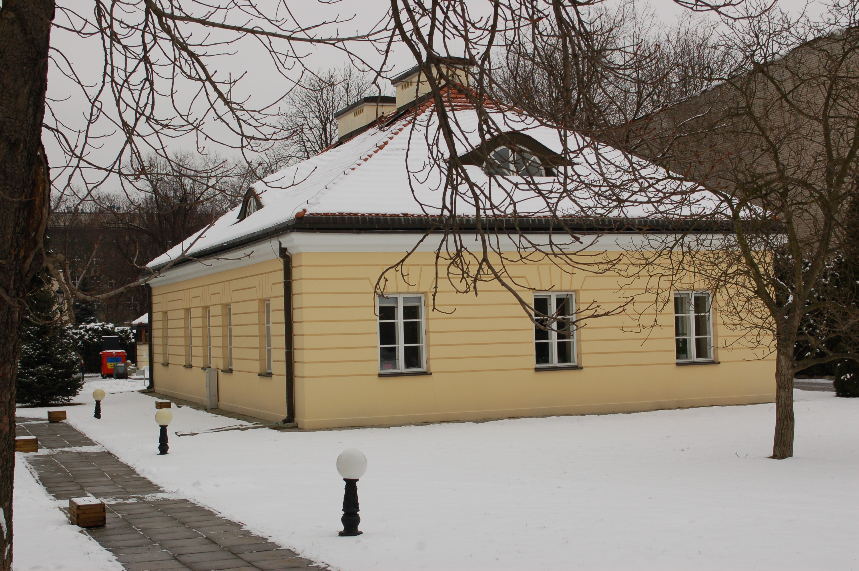 Palace ensemble Sielce, side building (northern)